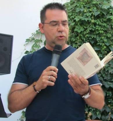 fotografia autor